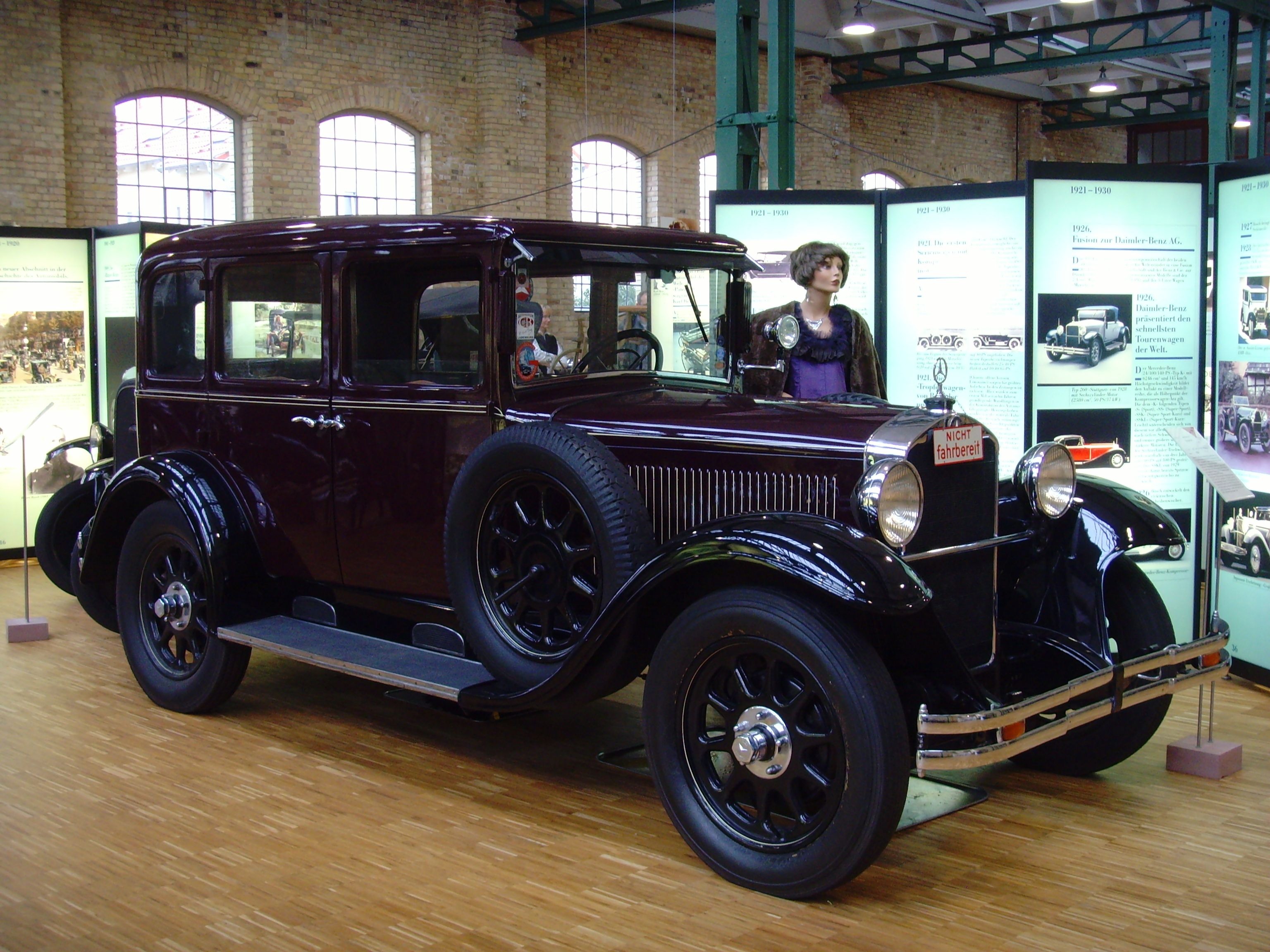 Automuseum Dr. Carl Benz Ladenburg